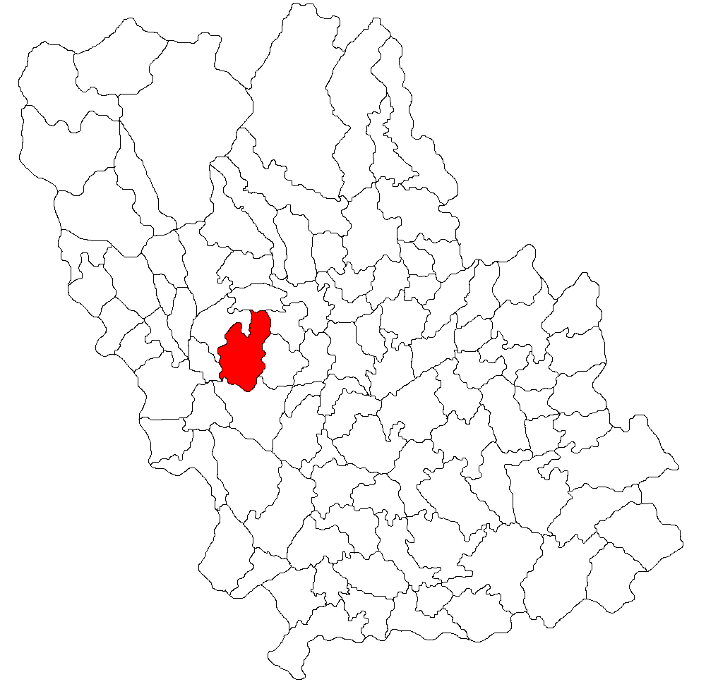 Categorie:Hărţi ale judeţului Prahova